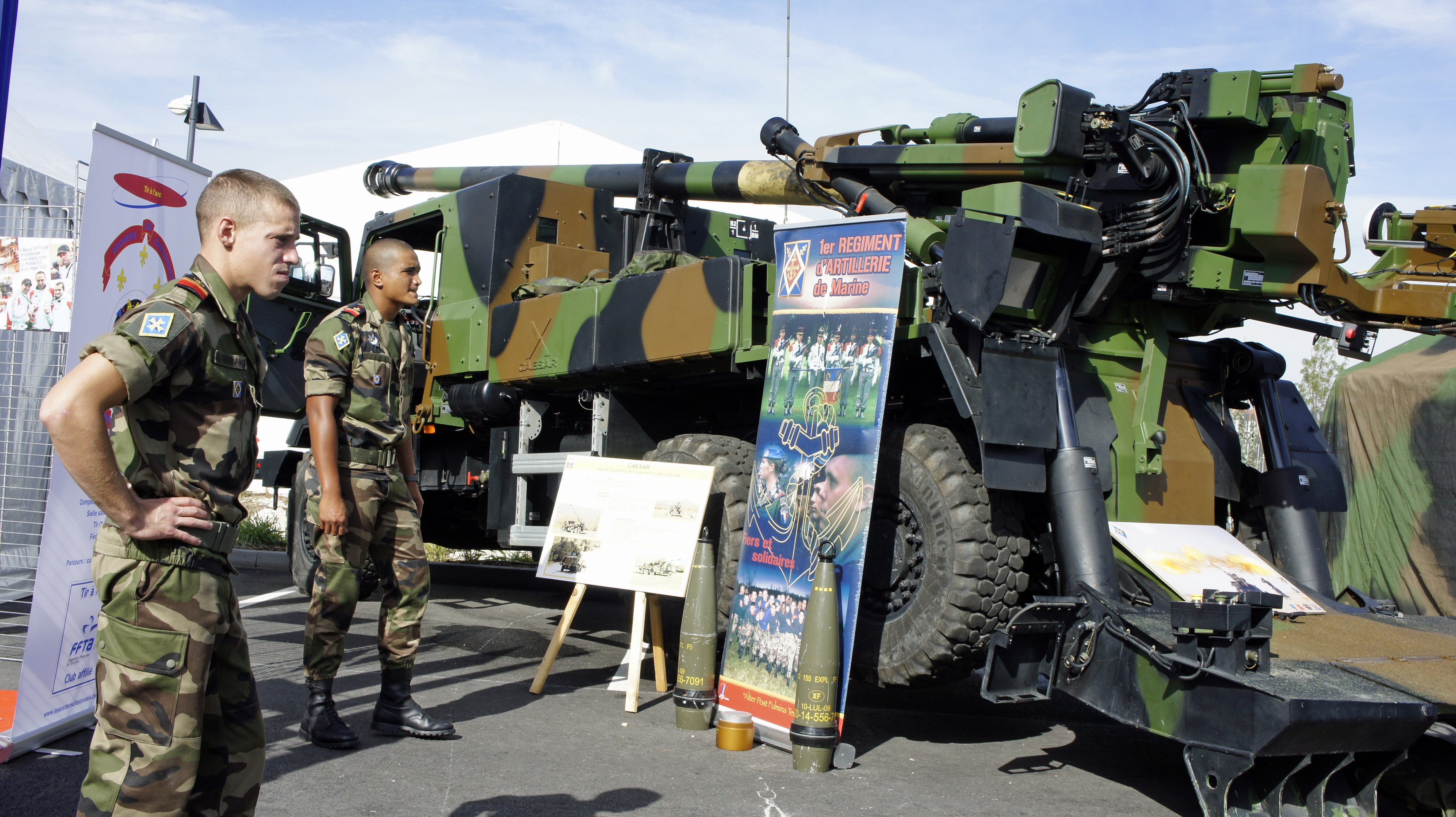 Véhicule CAESAR présenté lors de la foire de Châlons de 2012.